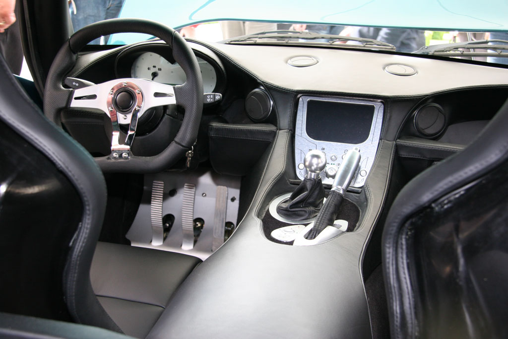 Interior de un TVR Sagaris